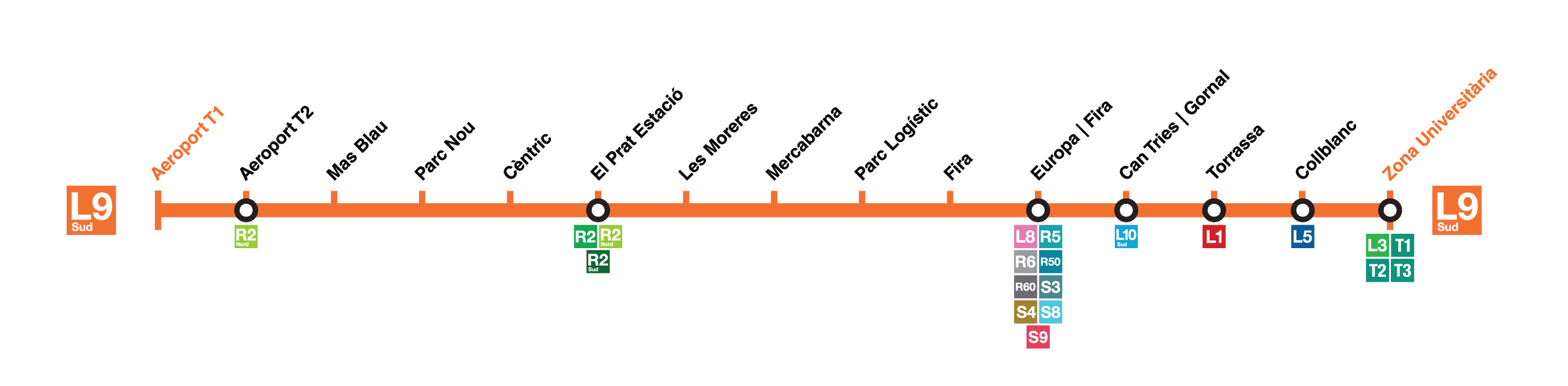 Termómetro de la línea L9 Sud del Metro de Barcelona